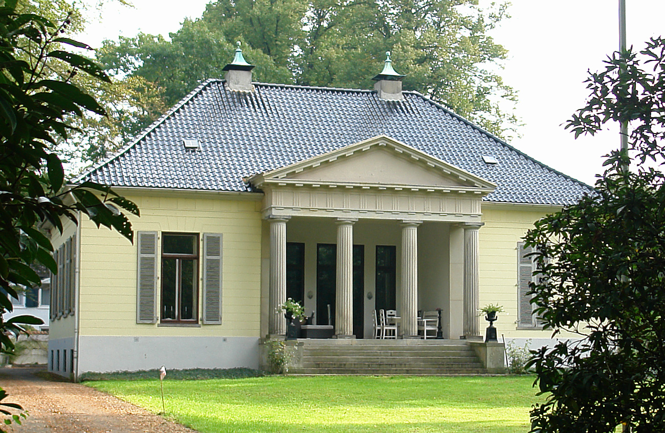 Haus Hoogenkamp, Landhaus Hucke, Les Flores in Bremen, Oberneulander Landstraße 33.Das abgebildete Objekt ist ein geschütztes Kulturdenkmal in der Freien Hansestadt Bremen, mit der Nr. 0945,T beim Landesamt für Denkmalpflege registriert.